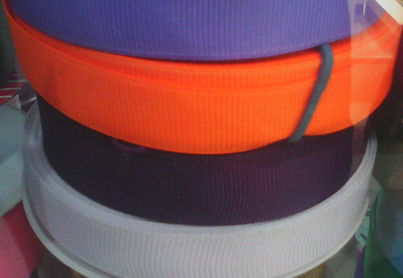 Разноцветные ленты из репса в рулонах